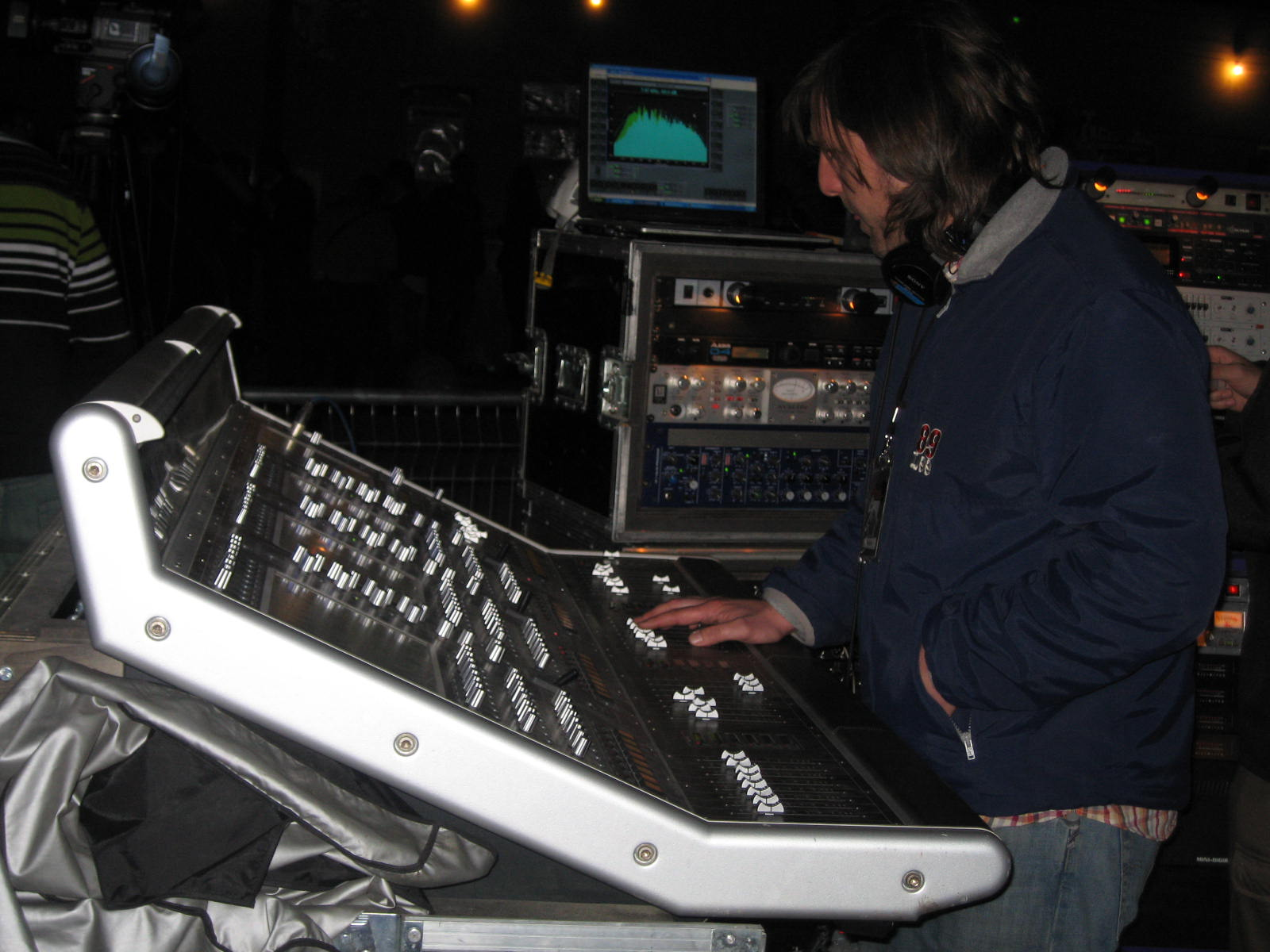 concierto merida